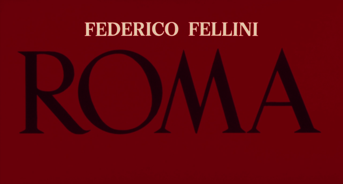 Title of Federico Fellini's movie "Roma"